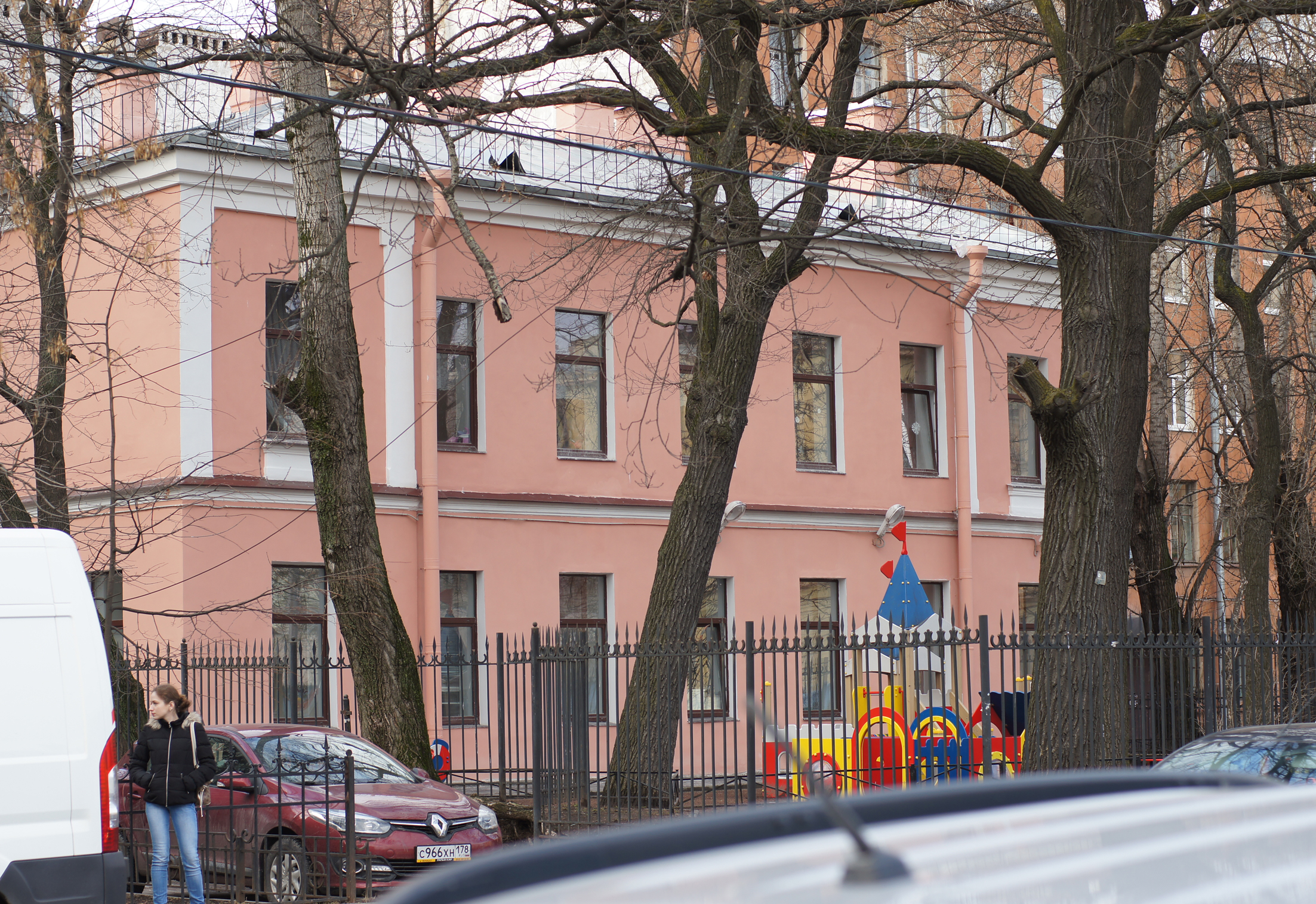 Здание Петролюбовской лечебницы для хронически больных детей Медико-филантропического комитета. (ныне детский сад № 71) Санкт-Петербург, Дегтярный пер., д. 12